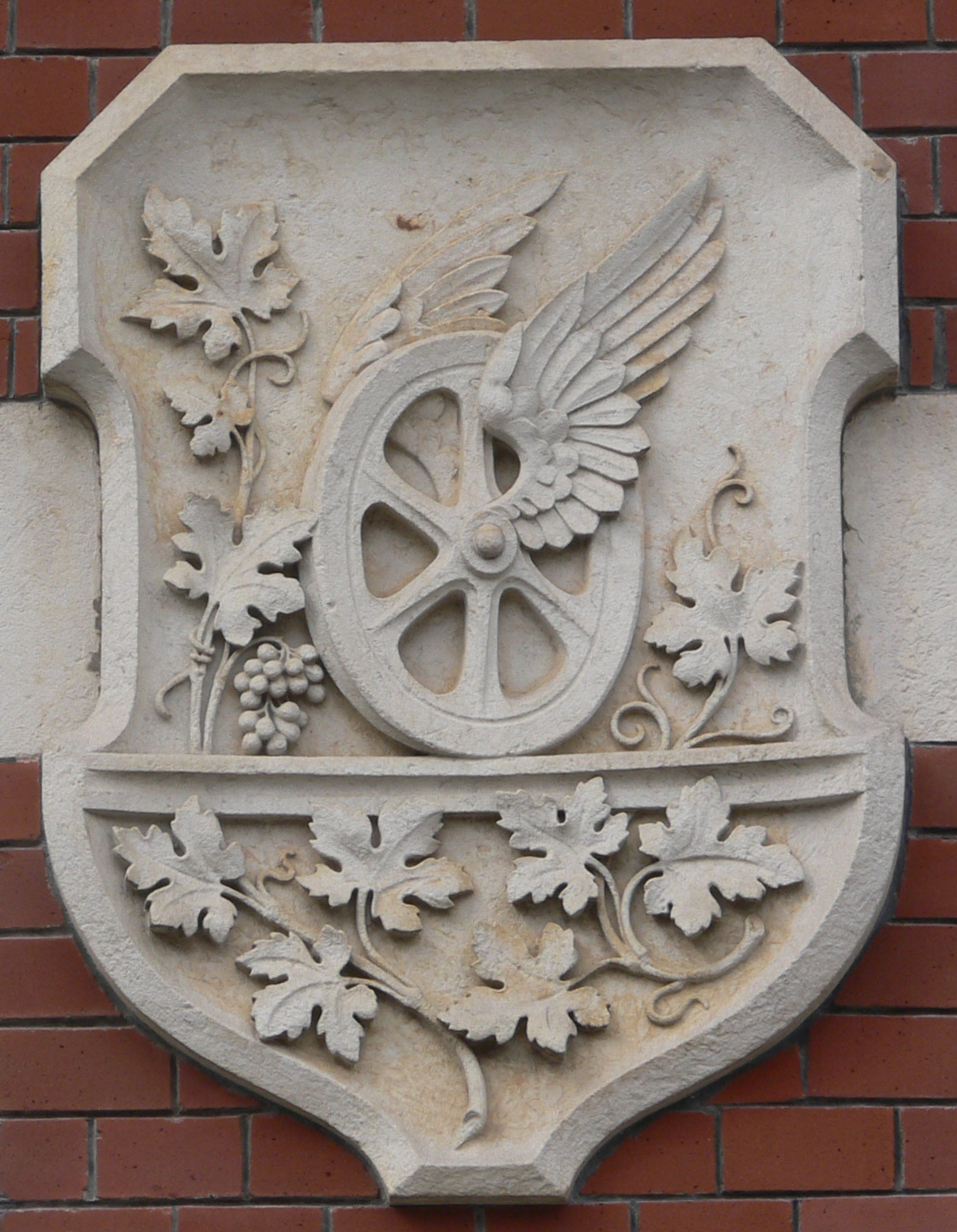 Erfurt, Hauptpostamt am Anger, Relief